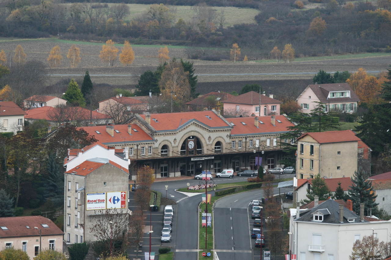 Ancienne gare de Chatel-Guyon.